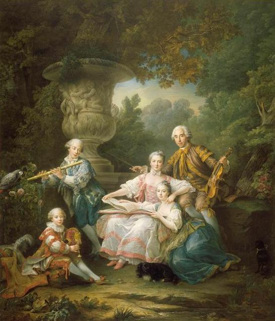 Louis II du Bouchet de Sourches (1711-1788), marquis de Sourches, comte de Montsoreau, grand prévôt de France ; sa femme, née Marguerite Henriette Desmarets de Maillebois (1721-1783) ; leurs trois enfants : Louis François (1744-1786), Yves Marie (1749-1818), Jeanne Madeleine Thérèse (1743-1765), future marquise de Vogüé.